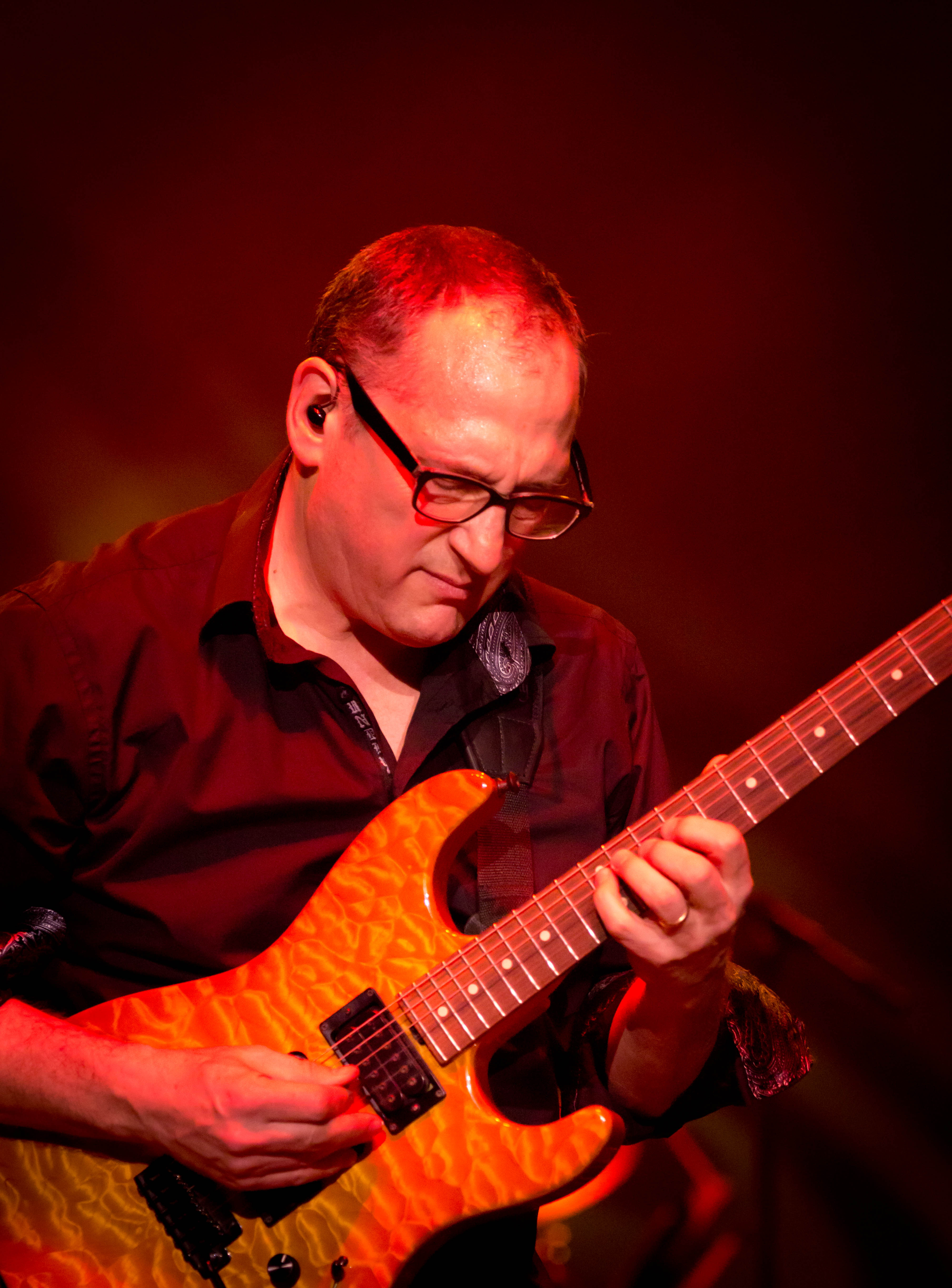 Chuck Loeb en el Fort Sam Houston Theater, EE.UU.